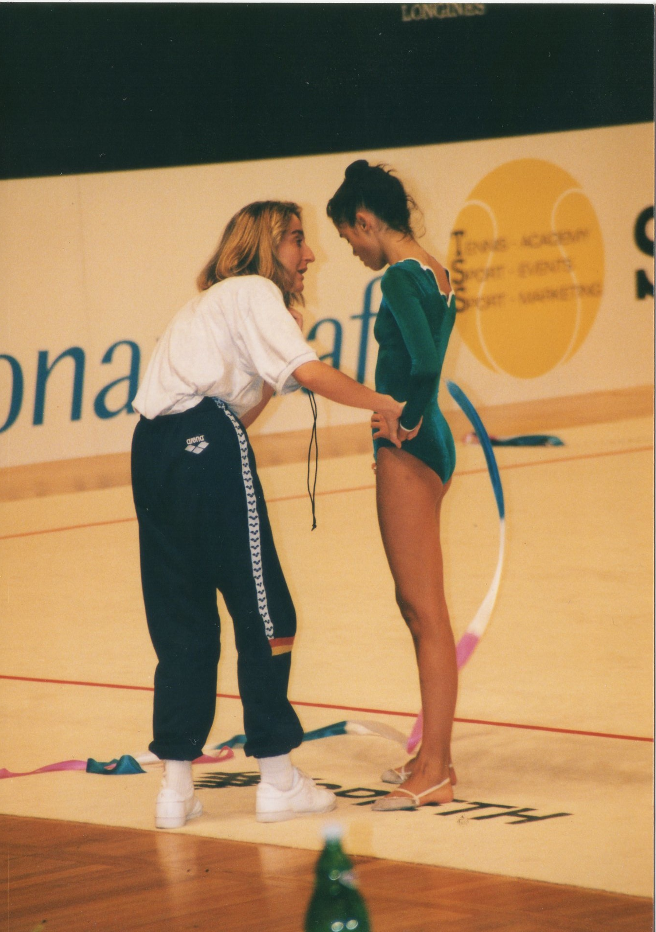 María Fernández Ostolaza motivando a Estela Giménez durante un entrenamiento oficial del conjunto español de gimnasia rítmica en el Campeonato Mundial de Viena en 1995.